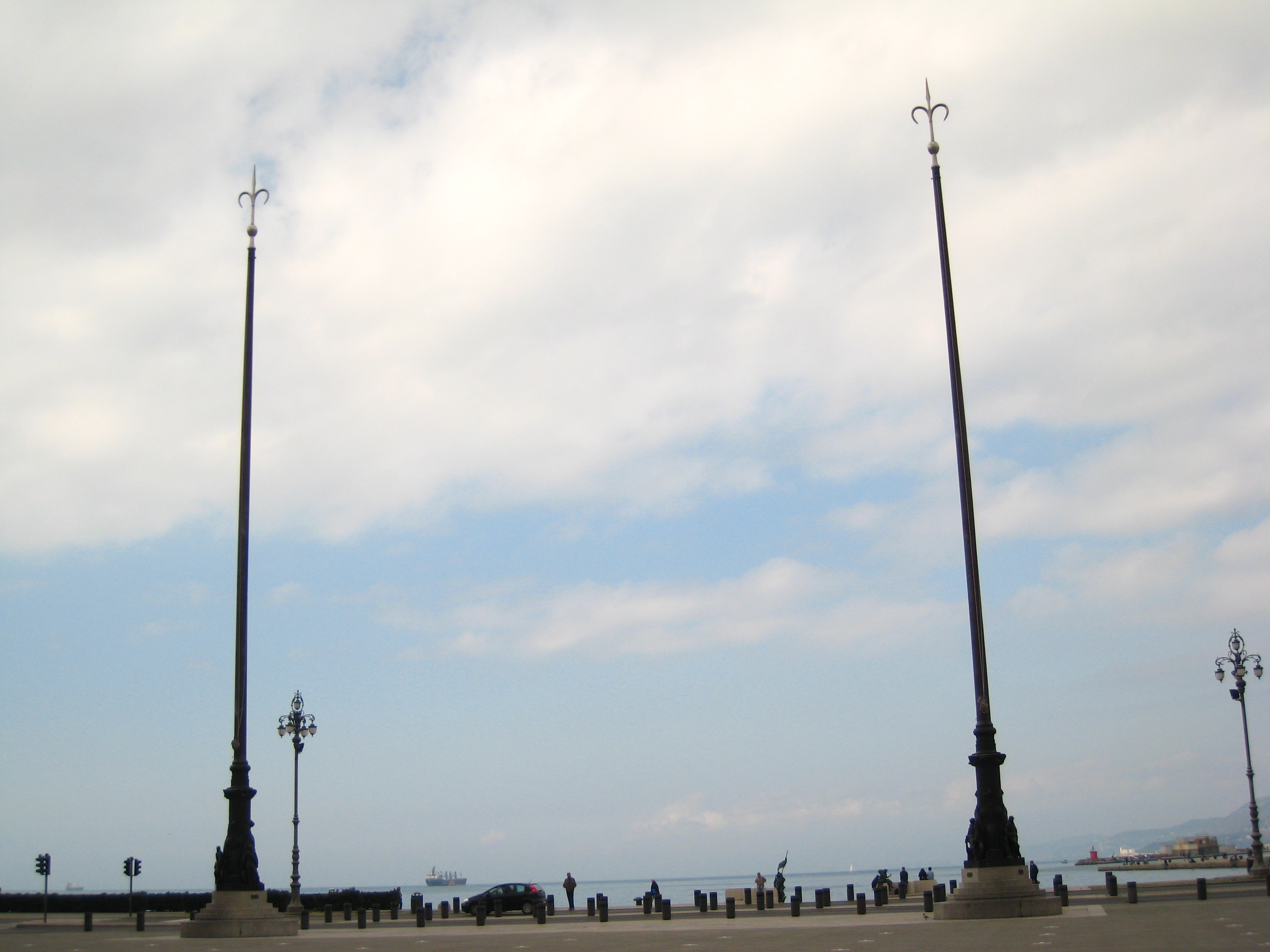 Piazza unità d'Italia - Trieste